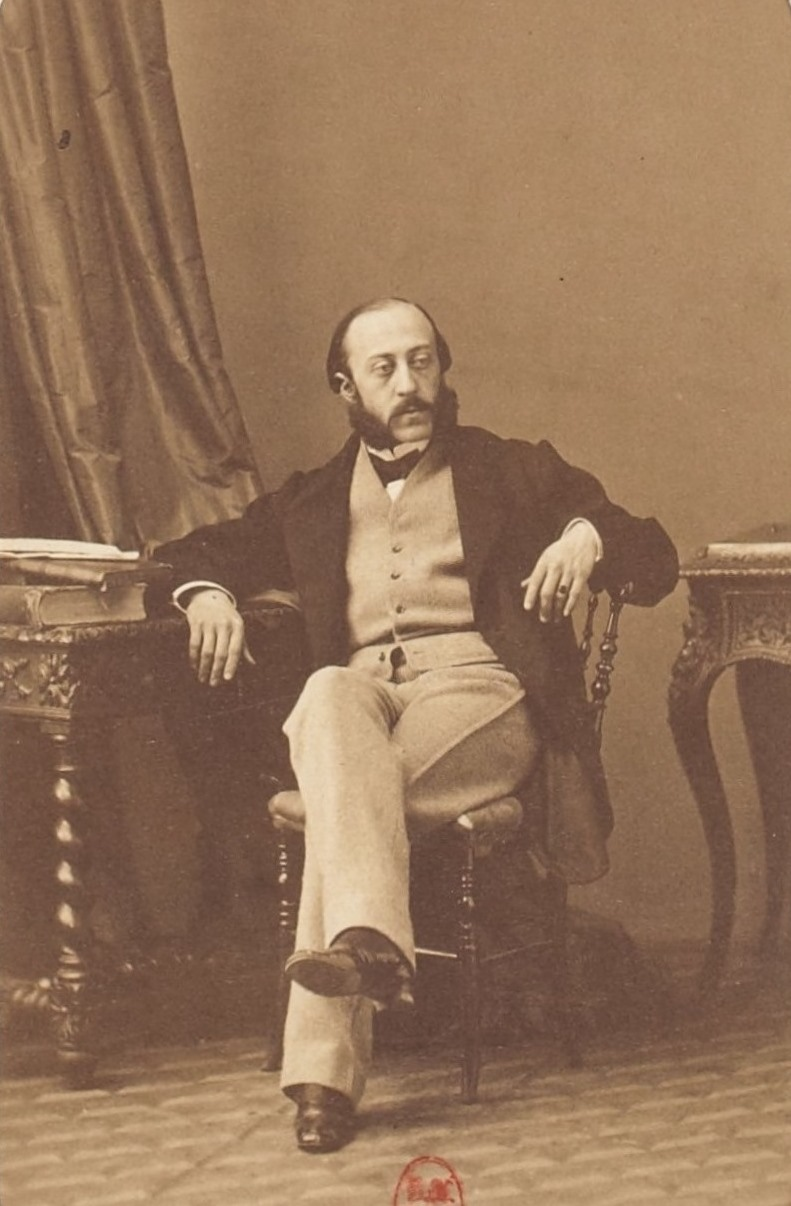 "Guillaume Guizot (G167063)".